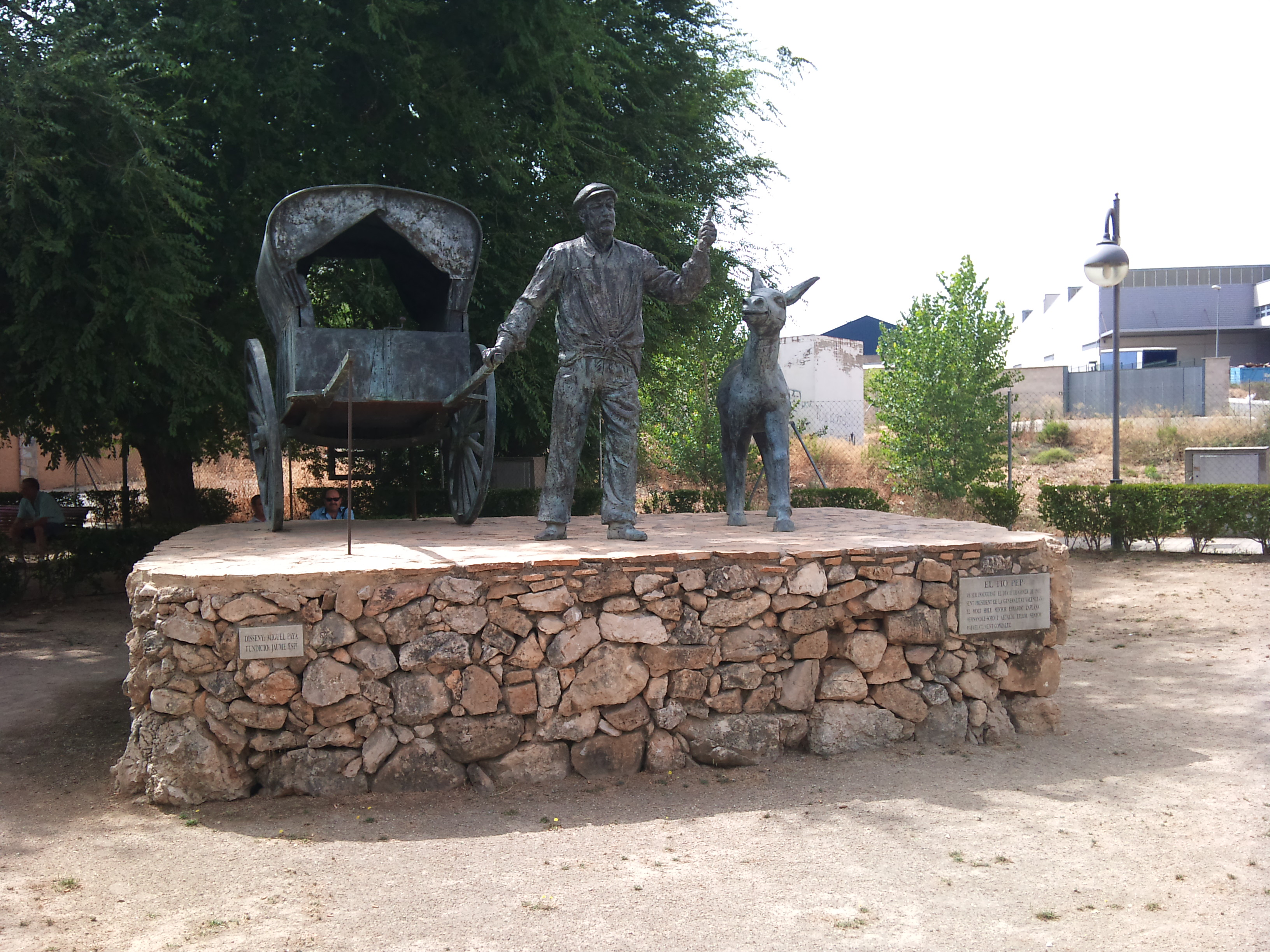 Monument al Tio Pep a Muro d'Alcoi, el Comtat.